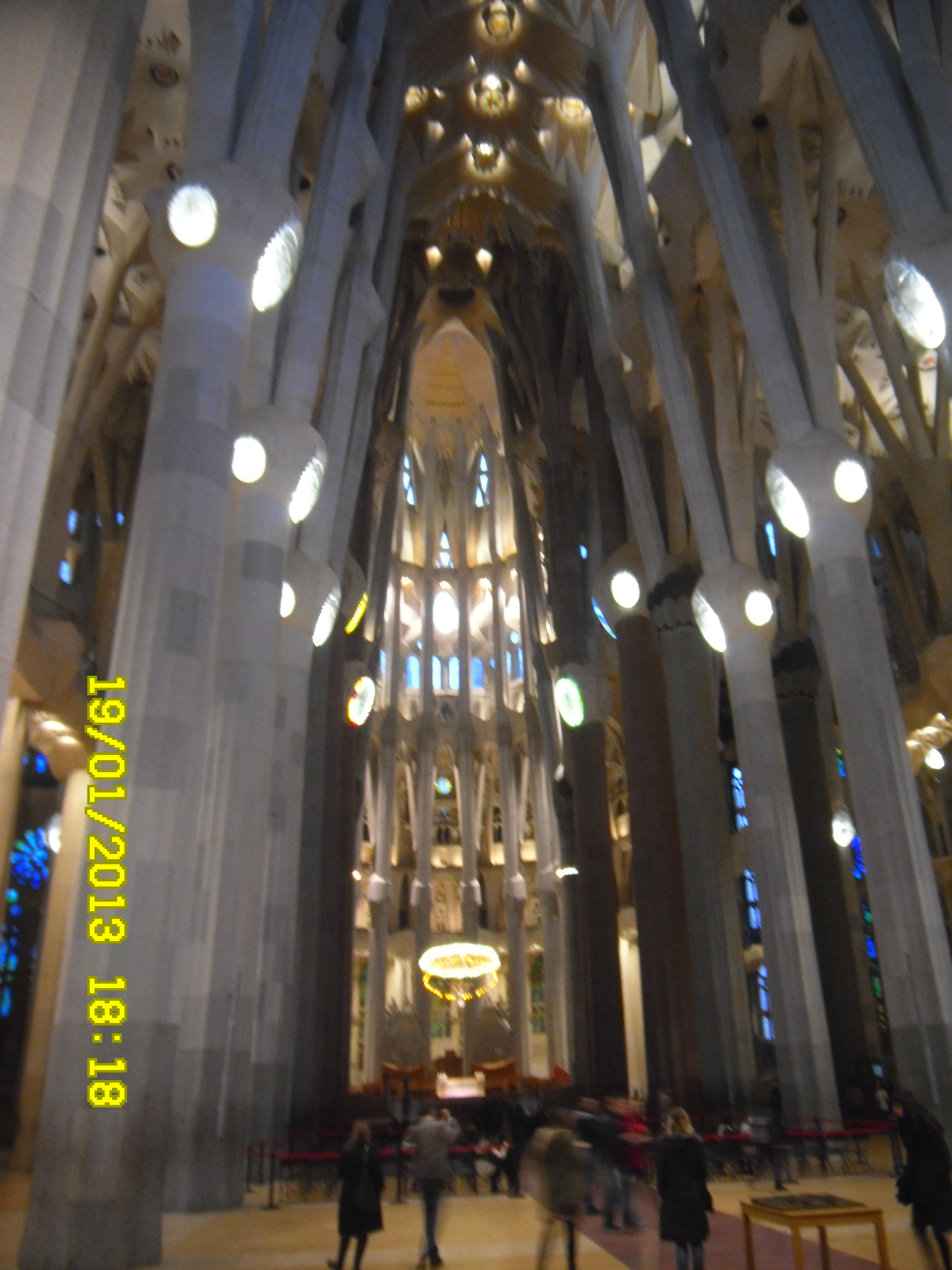 La Sagrada Familia, Barcelona, Spain